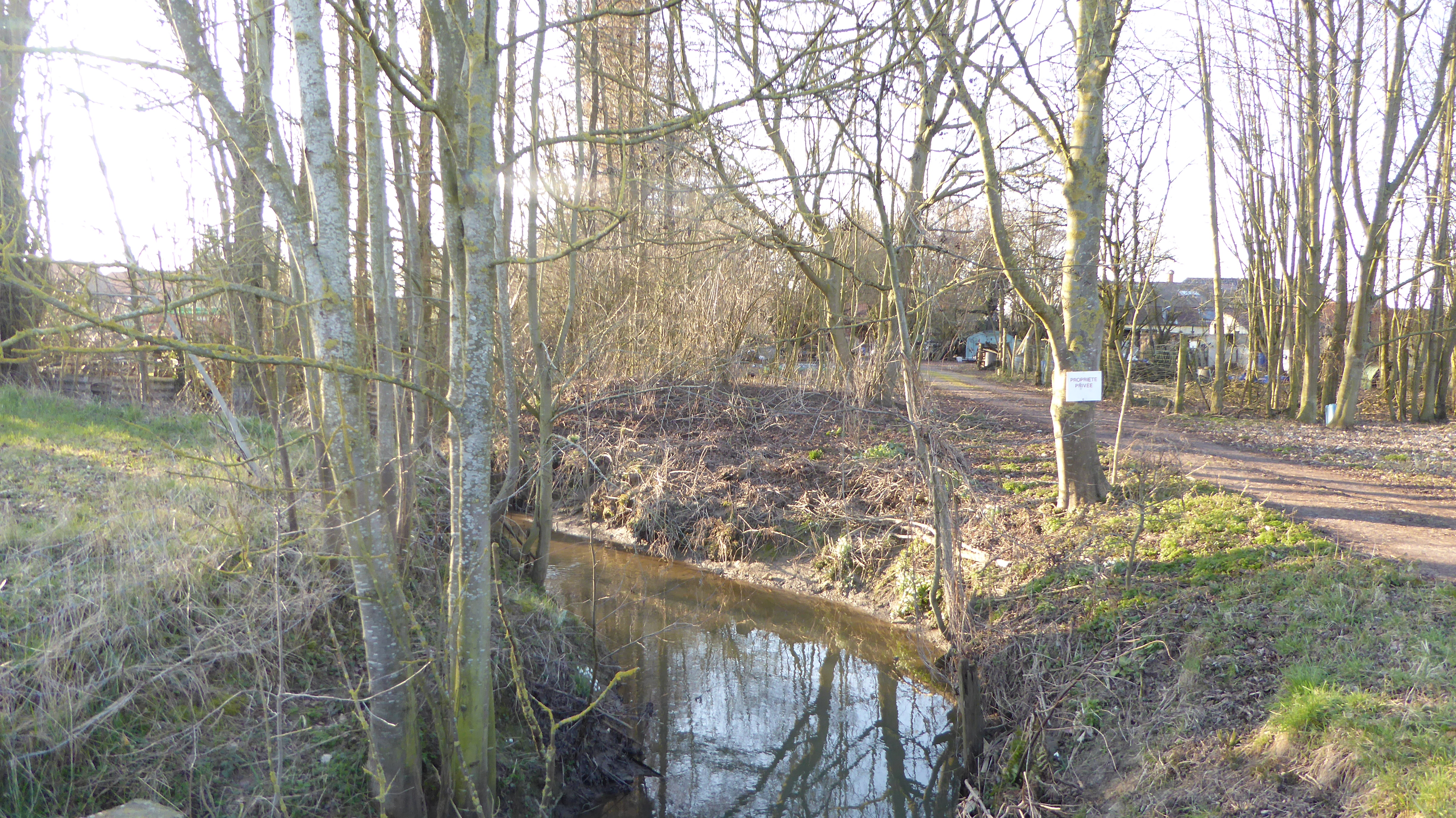 La Glanerie l'Elnon au pont de la Libération- Rumes, Région wallonne.- Belgique